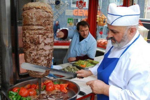 Doner Kebap ở Ý được nhiều người Ma rốc nhập cư ưa thích.